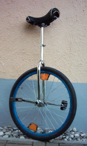 Einrad/Unicycle